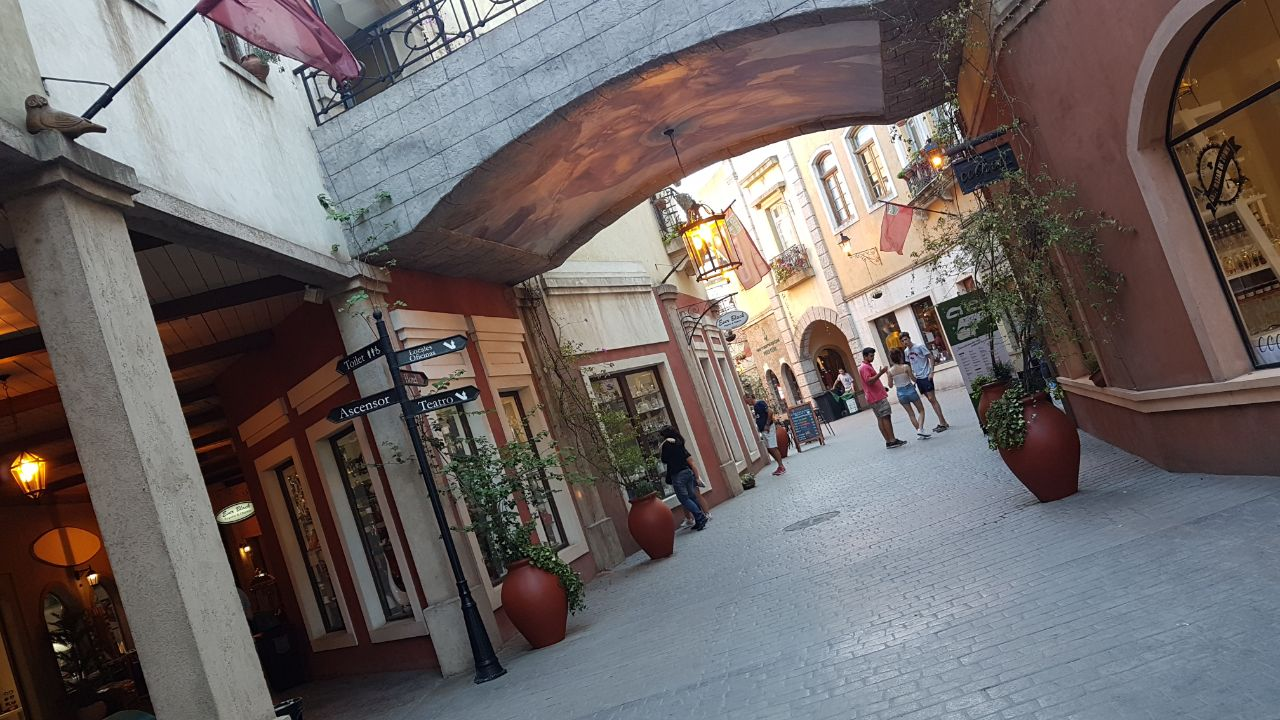 Plaza Canning Shopping